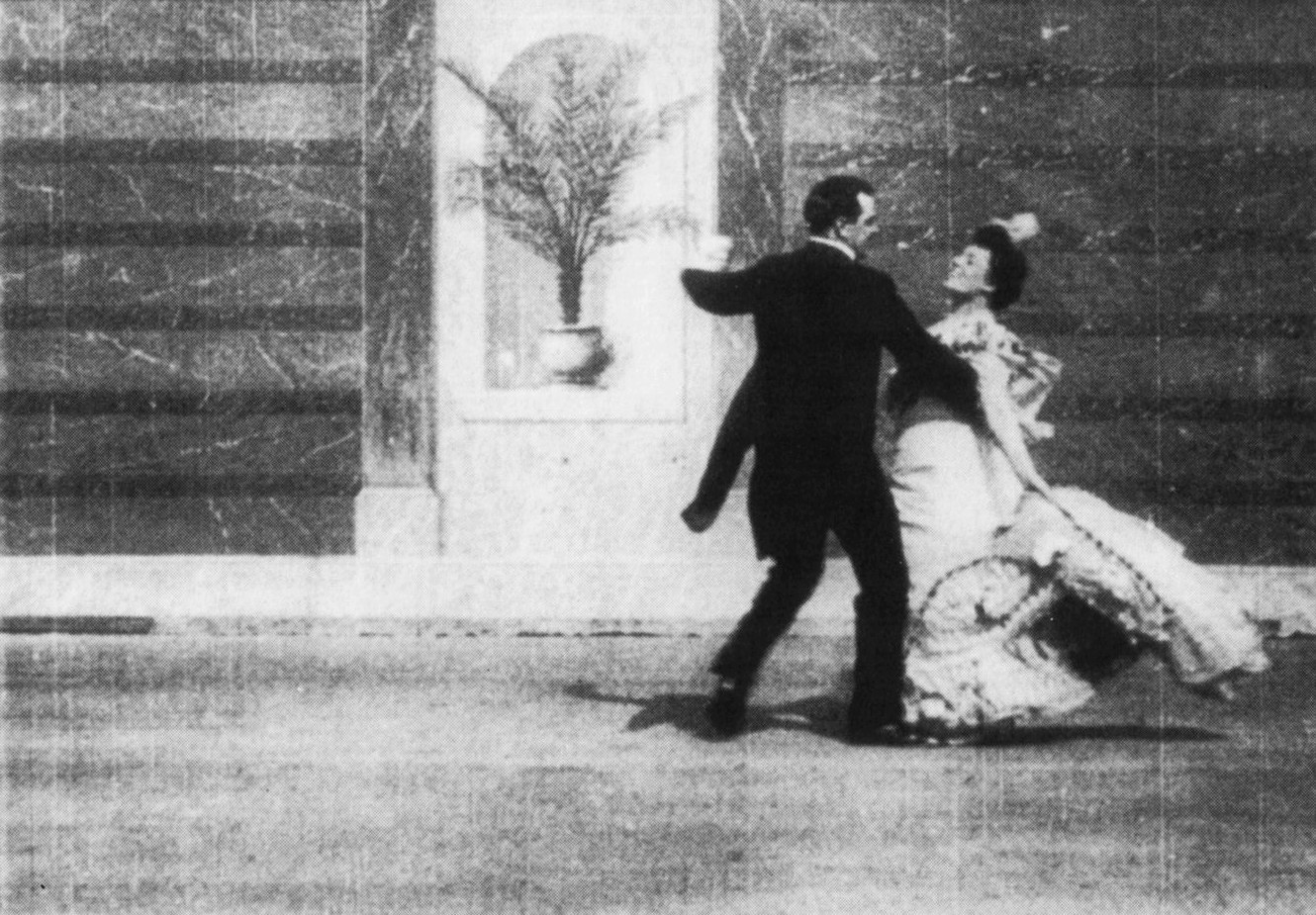 Emma Meissner och Calle Barcklind i "Glada änkan"